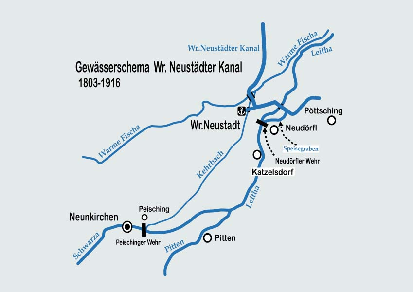 Die Wassereinspeisung des Wiener Neustädter Kanals von 1803 bis 1916